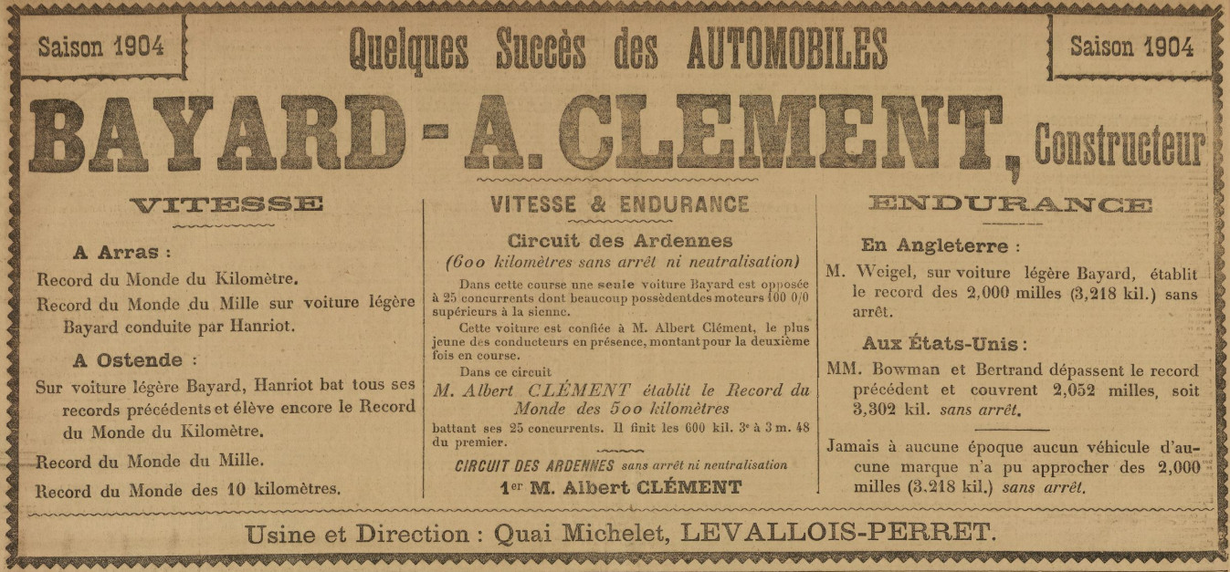 Copie d'une publicité sur le journal français L'Auto diffusée par Bayard-Clément en 1904.